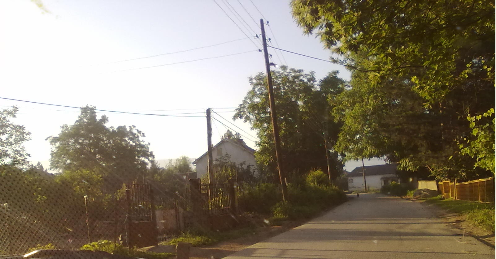 Влезот во тетовско Жилче